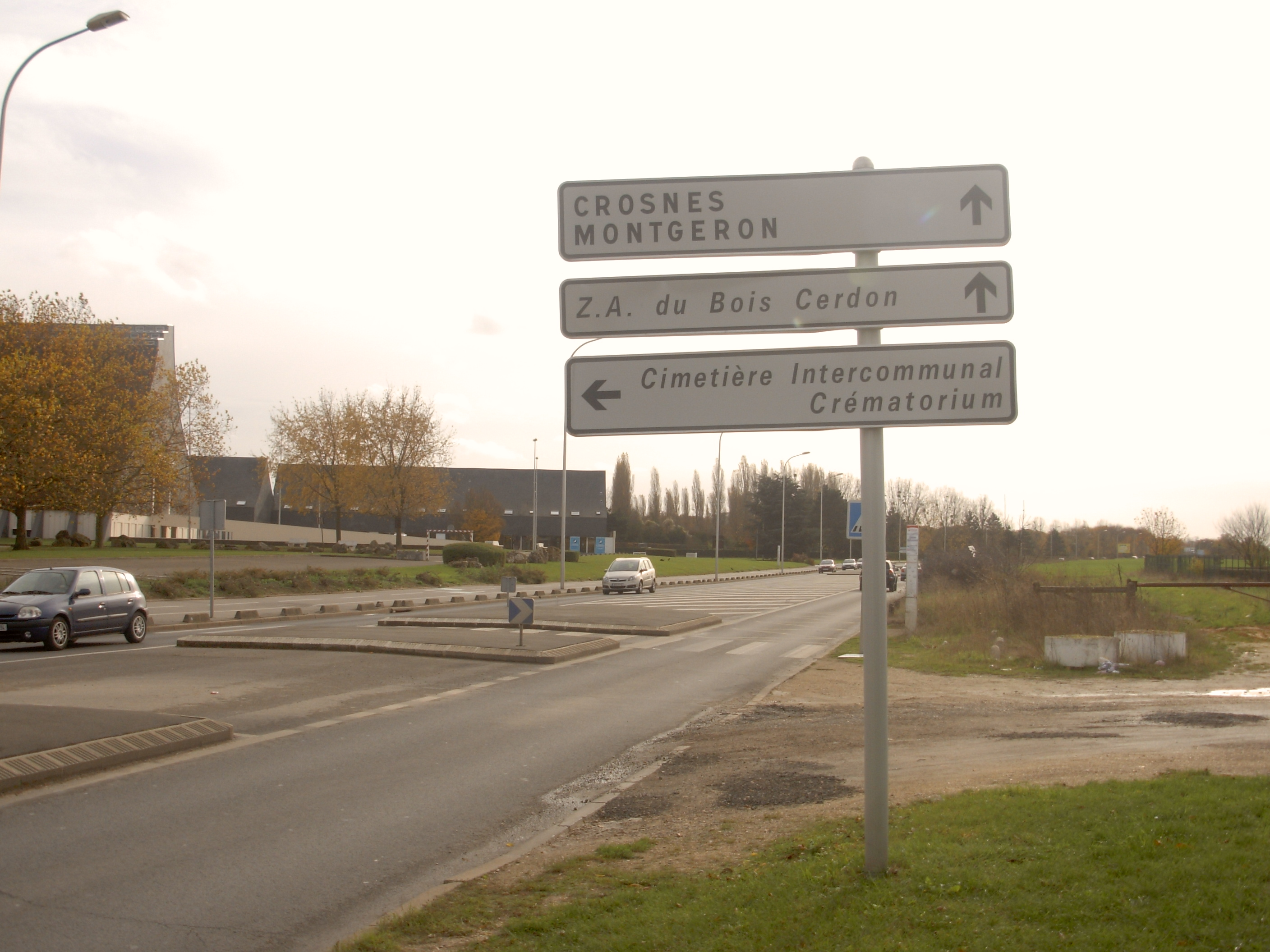 Panneau indicateur sur la RD94D, dans le Val-de-Marne, comportant la graphie « Crosnes ».